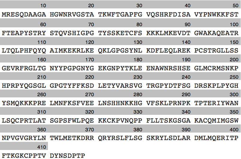 Es pot observar la seqüència d'aminoàcids de LEM en els humans, té una longitud de 418 aminoàcids.